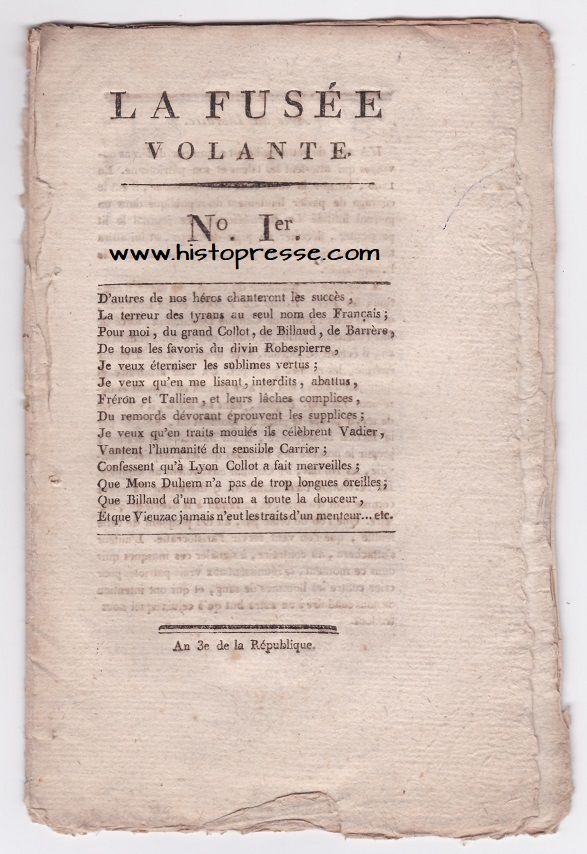 J'ajoute un journal créé par Dusaulchoy La Fusée Volante de 1795.